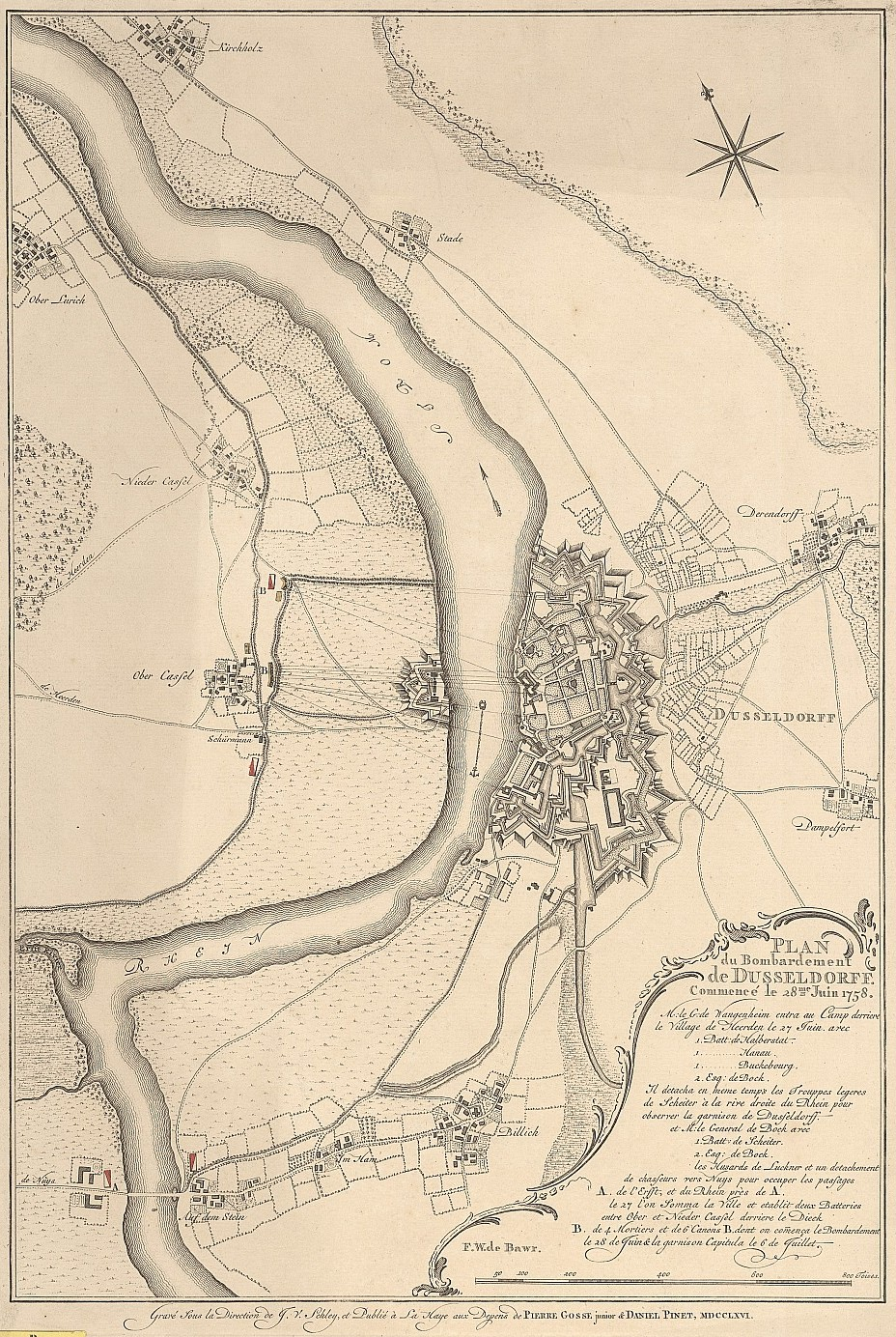 Plan du Bombardement de Düsseldorf: Commencé le 28me Juin 1758 F. W. de Bawr. Gravé Sous la Direction de J. v. Schley. - Ca. 1:10 000 - La Haye : Pierre Gosse junior & Daniel Pinet, 1766 Kupferstich ca. 31 x 46 cm